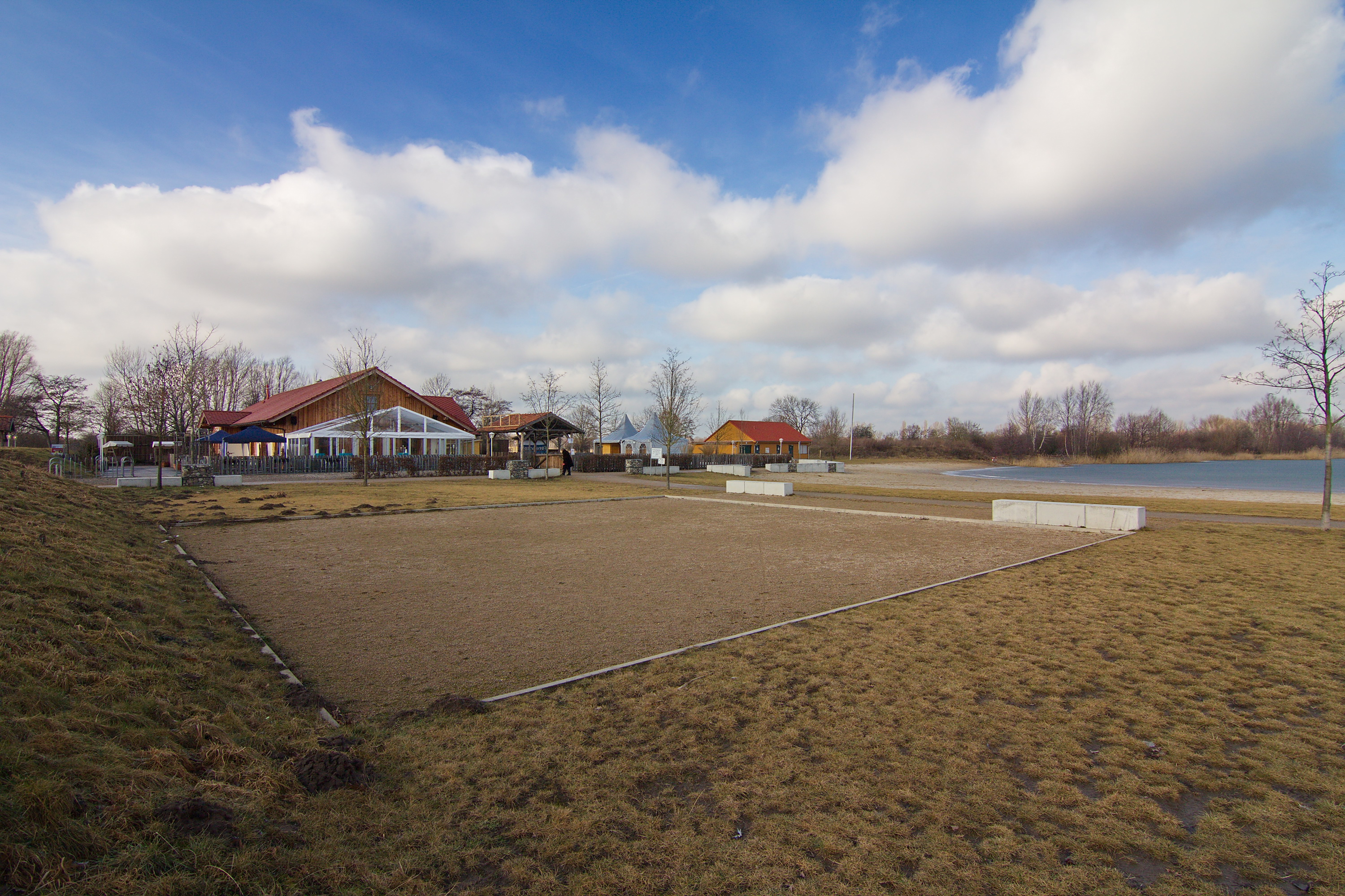 Hufeisensee Wietzepark in der Niedernhägener Bauerschaft (Isernhagen), Niedersachsen, Deutschland.